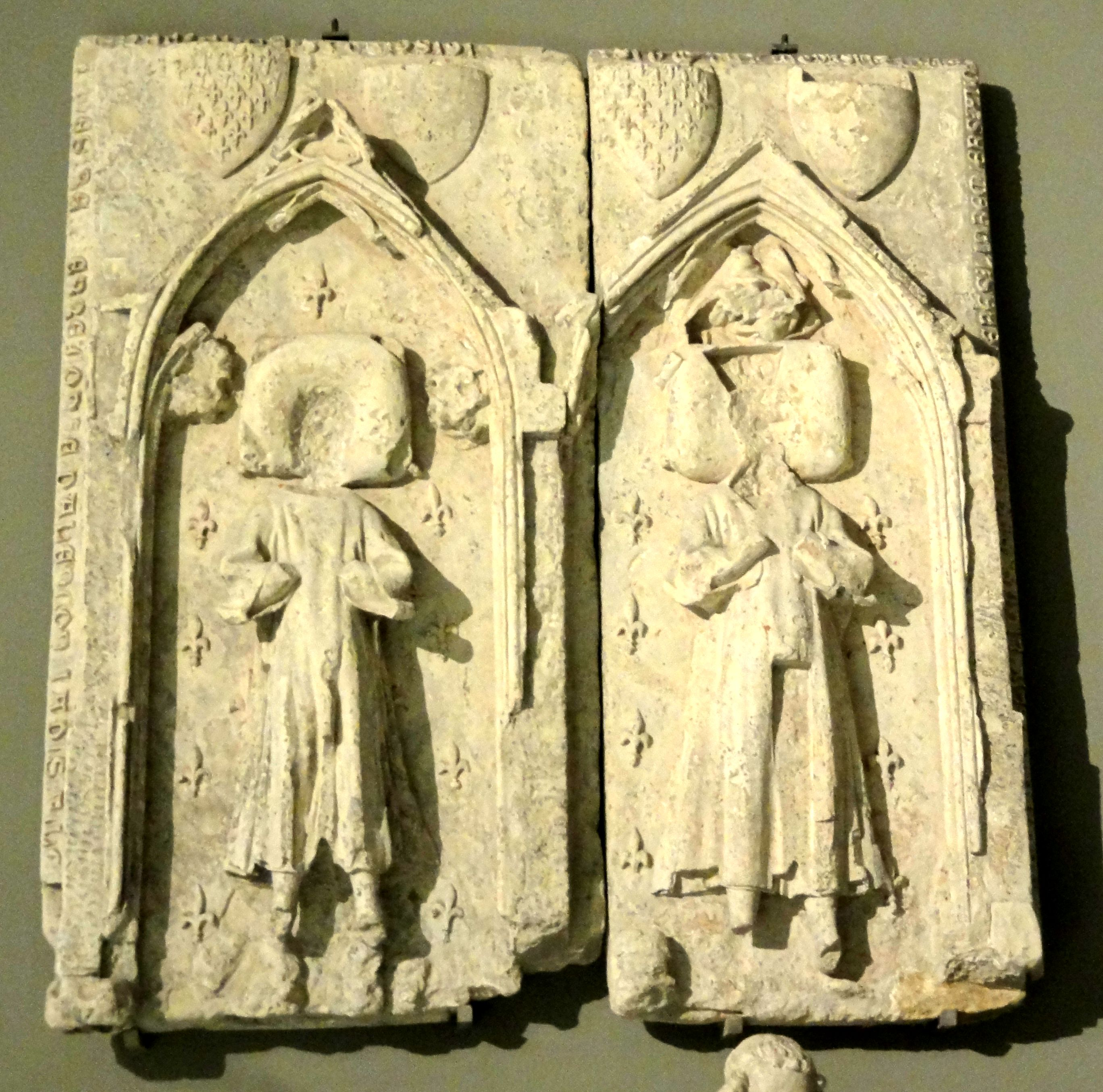 Abbaye de Royaumont, pierres tombales de Louis et Philippe d'Alençon, petits-fils de saint Louis, fin XIIIe s., déposé au musée de Cluny Cl. 11660.